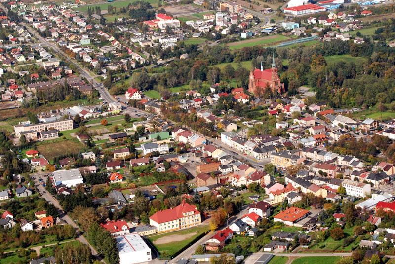 zdjęcie z lotu ptaka